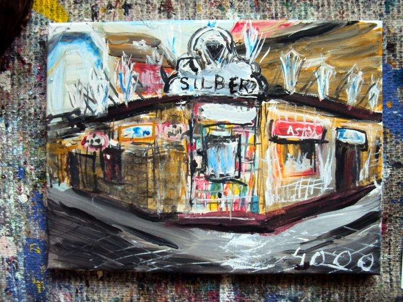 Zum Silbersack